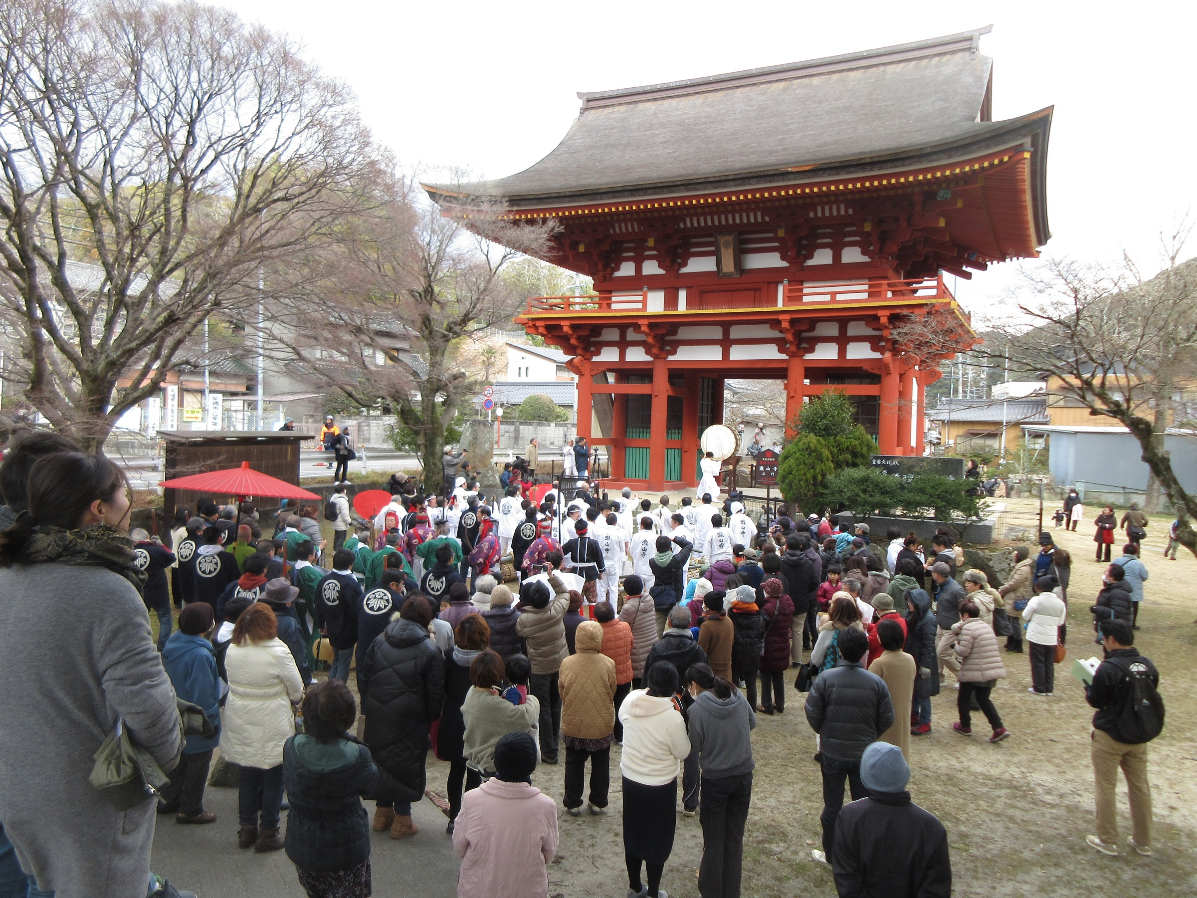 滝山寺鬼まつり（岡崎市滝町）